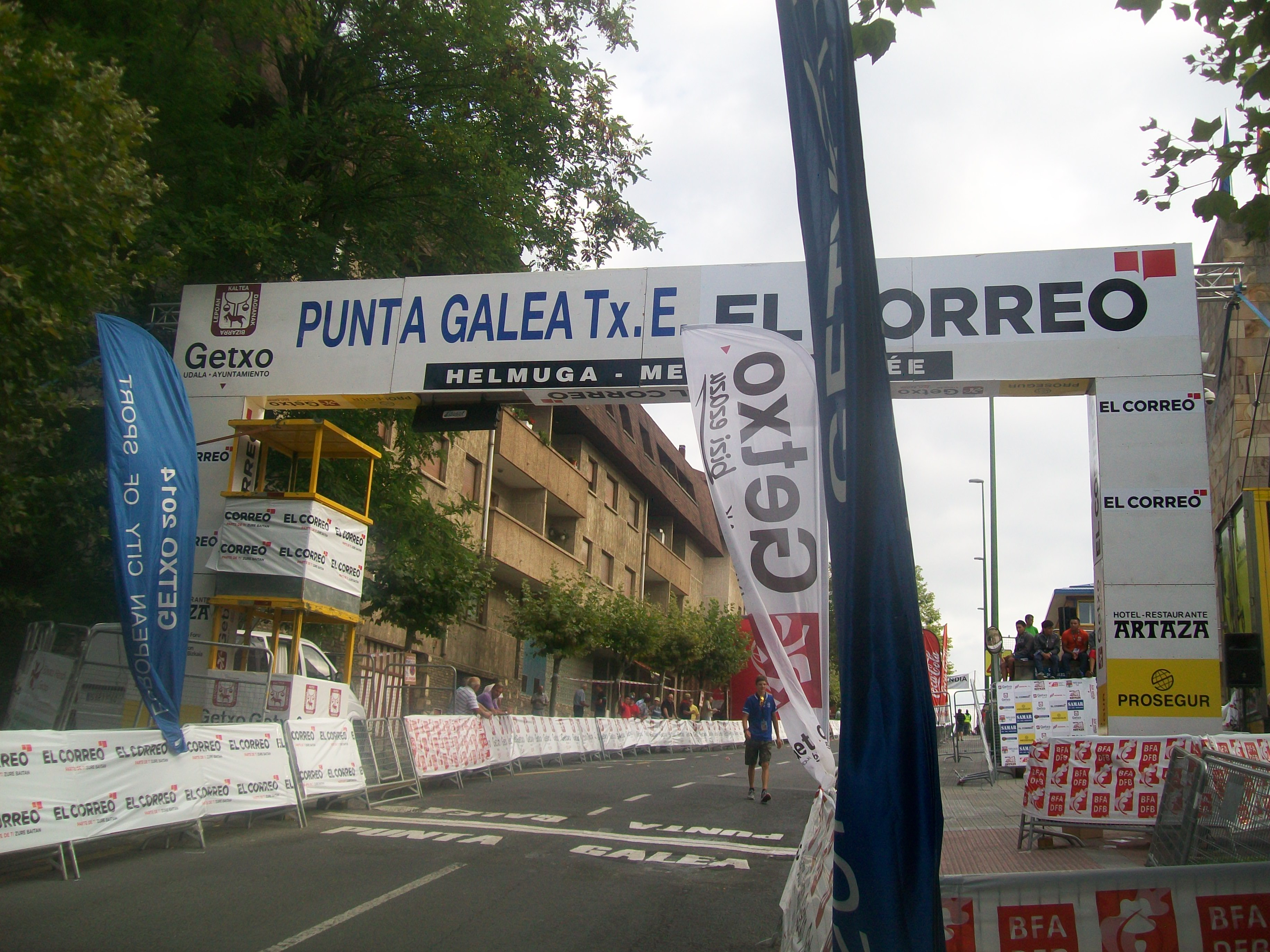 Meta situada en la cota Txomitxu-Arkotxa